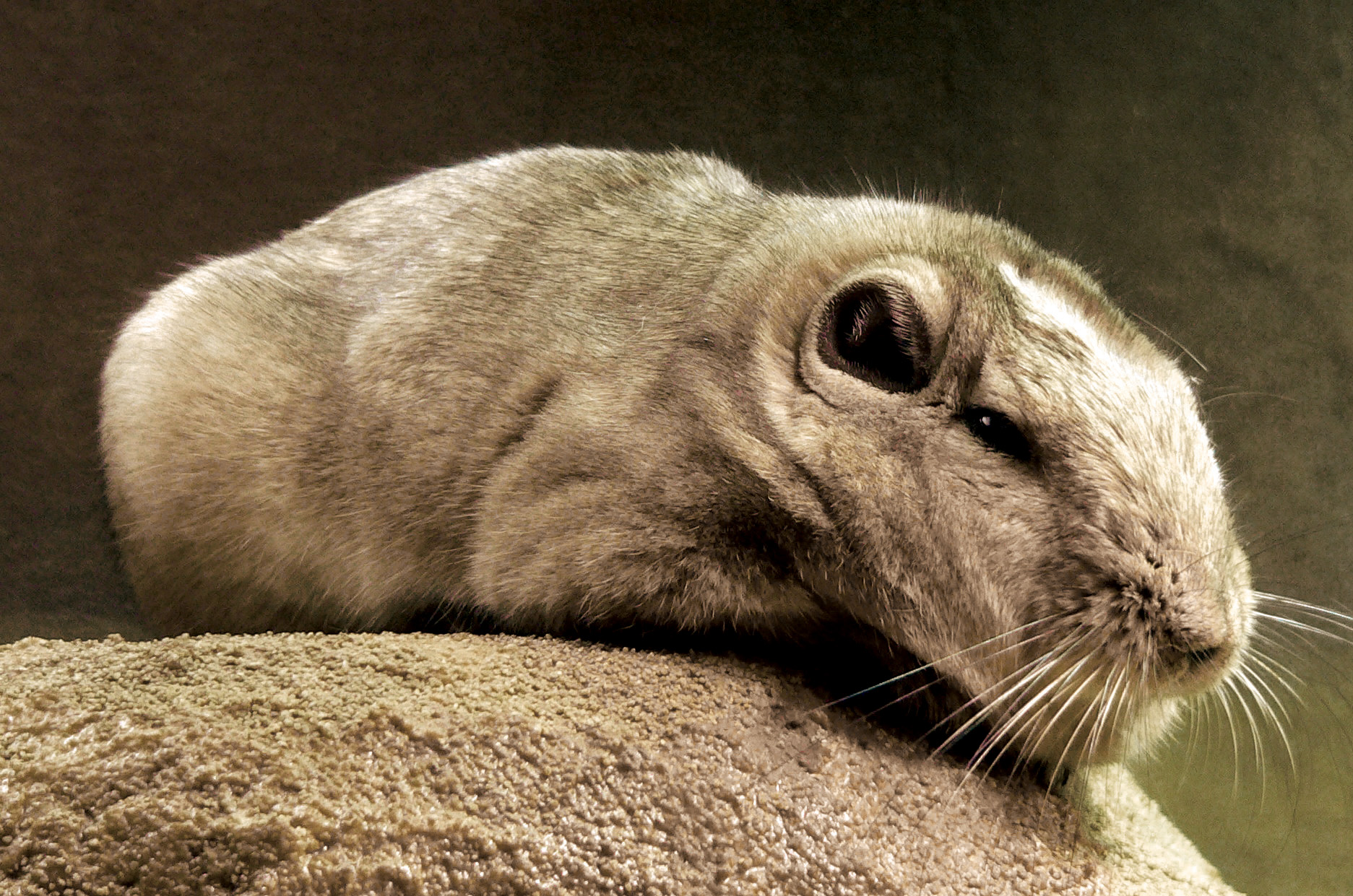 Gundi Ctenodactylus-ALT